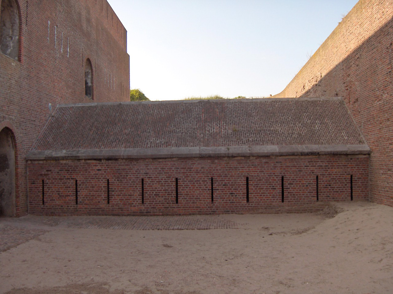 caponnière in Fort Napoleon - Ostend, Belgium